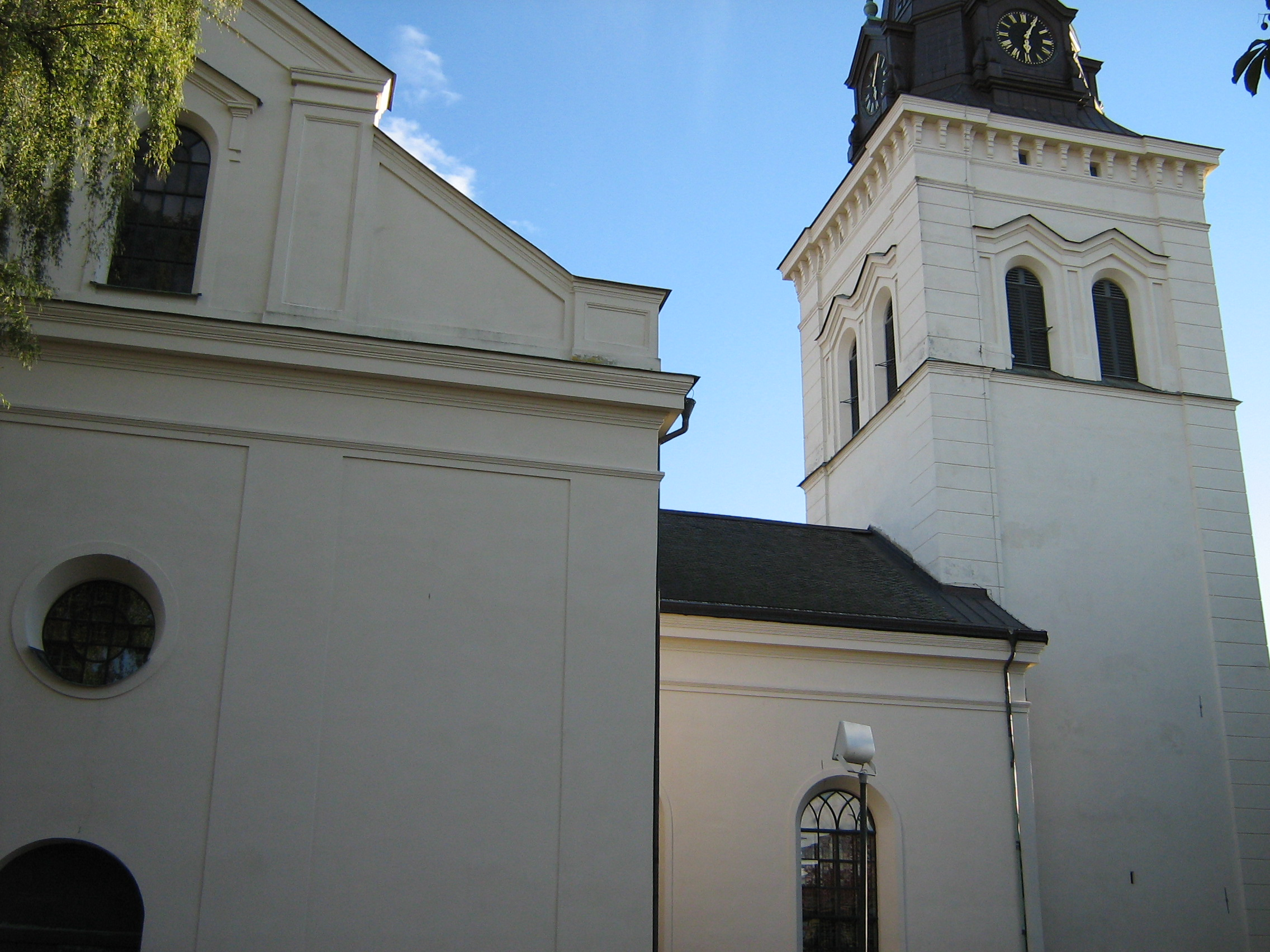 Karlstads Domkirke.